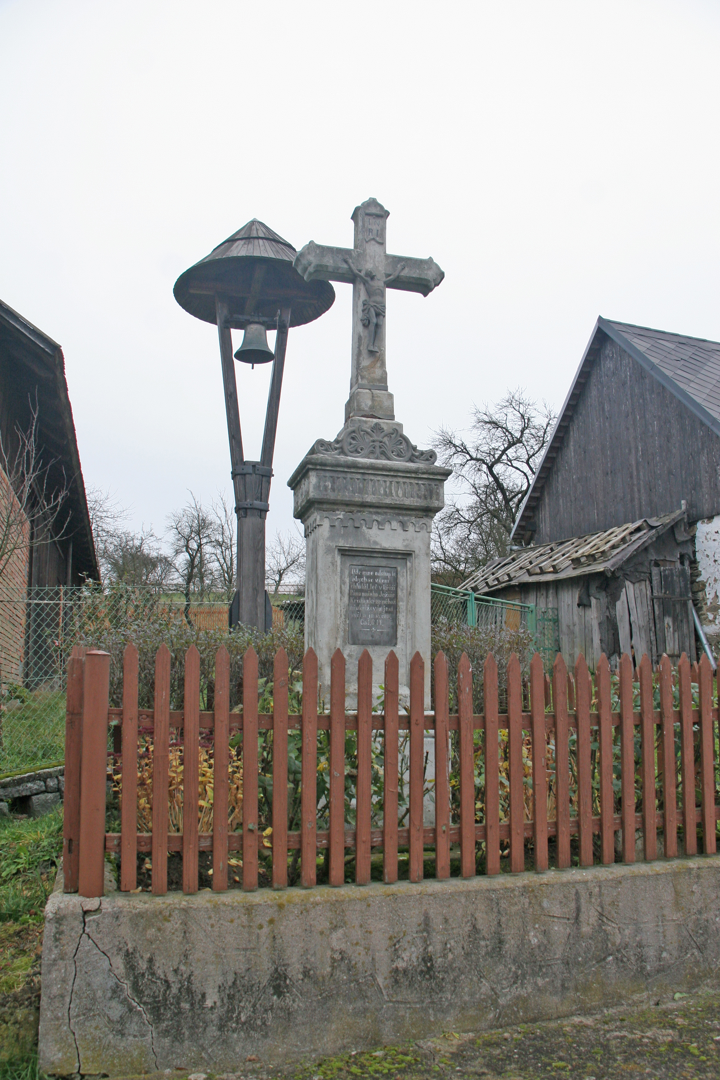 Libkov křížek